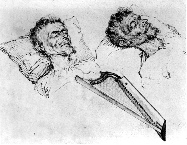 Carel van Mander op zijn sterfbed